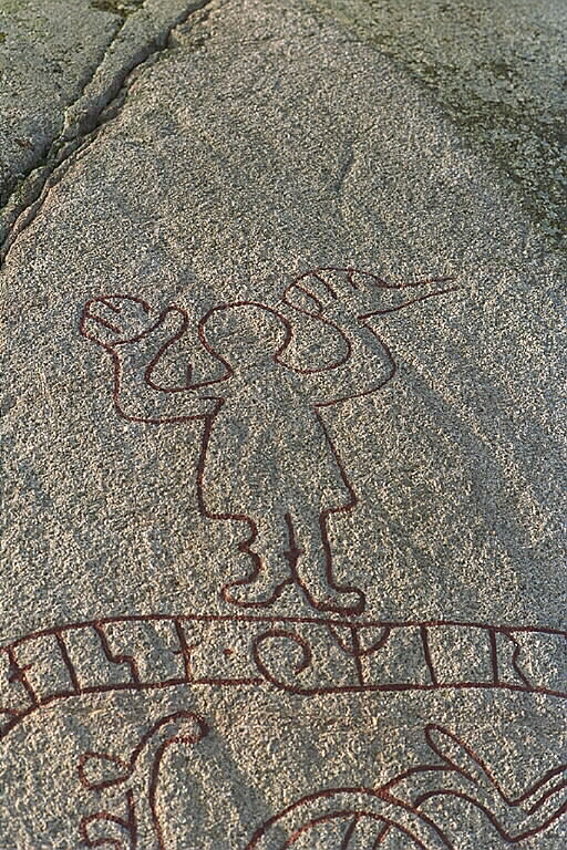 Täby 660. Detalj av människofigur högst upp på ristningen. Täby 660